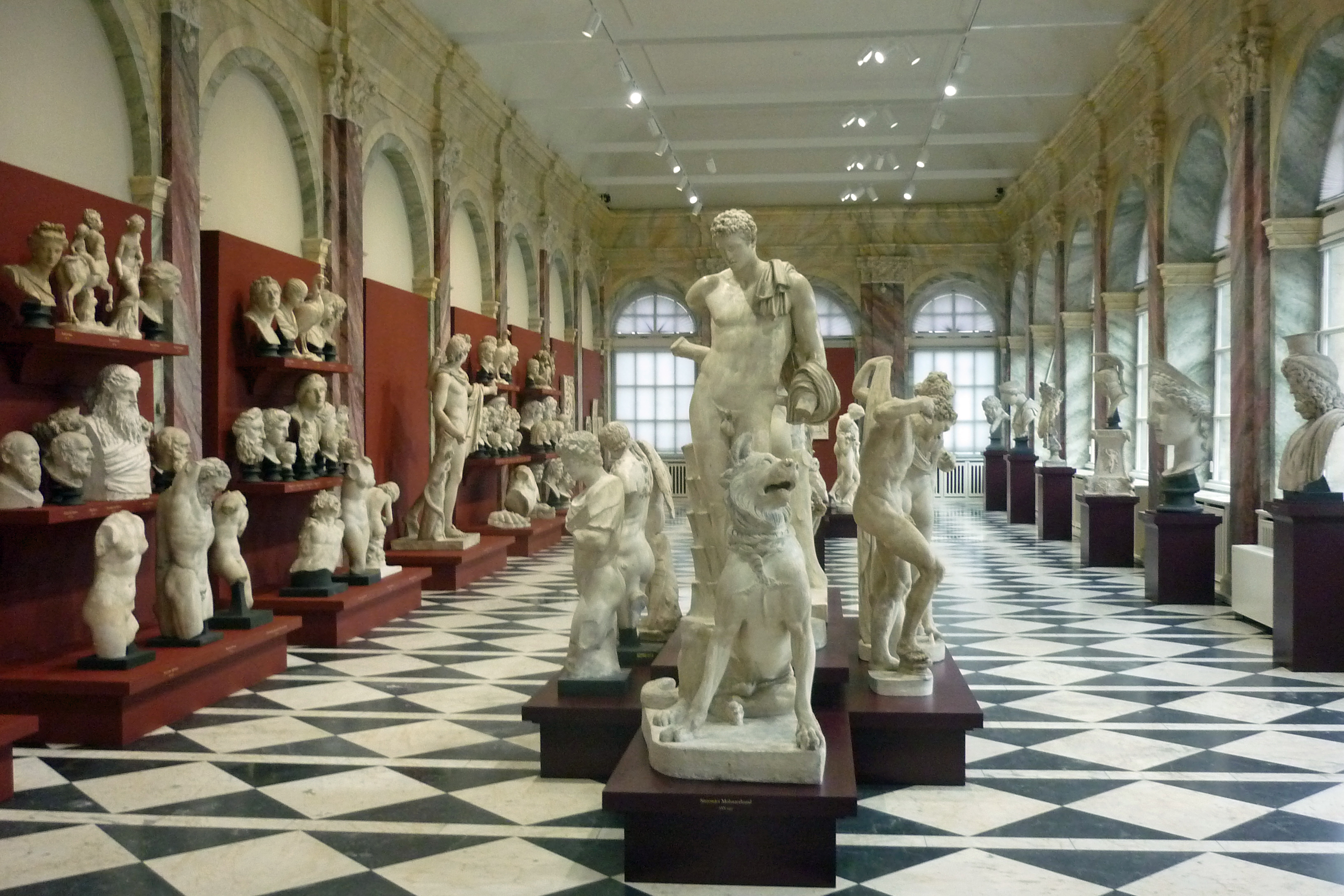 Blick in den Deutschen Saal der Staatlichen Kunstsammlungen Dresden mit der neu präsentierten Mengsschen Abgusssammlung